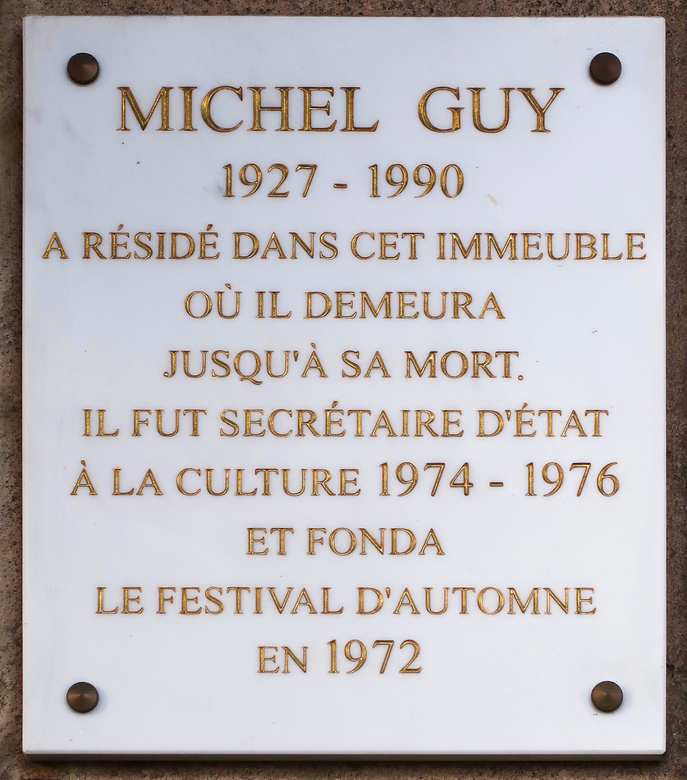 Plaque en hommage à Michel Guy, 156 rue de Rivoli (Paris, 1er).